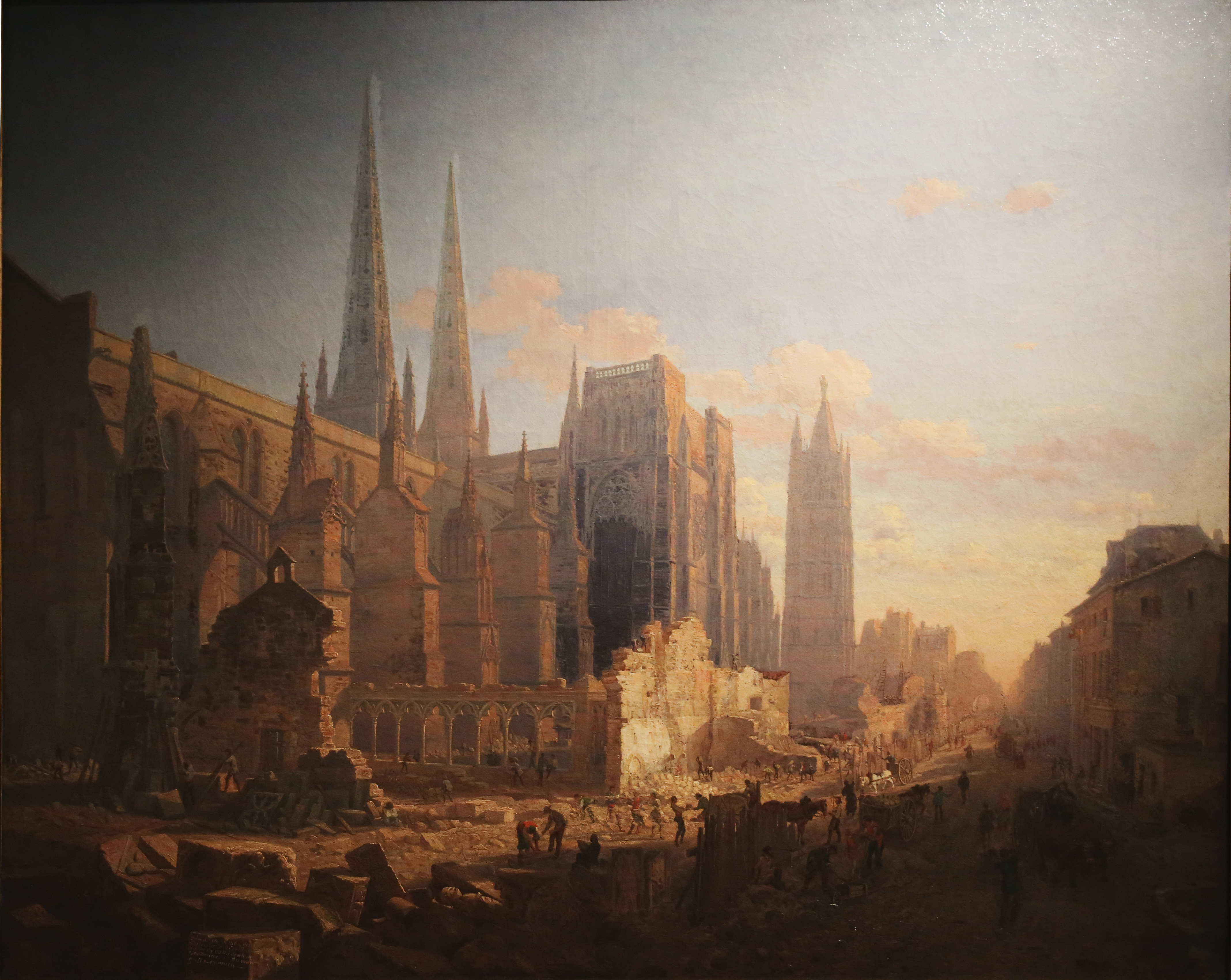 Peinture à l'huile sur toile de Léo Drouyn (1816-1896). Ce dégagement était nécessaire à la réalisation du cours d'Alsace et Lorraine.